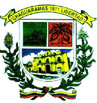 escudo del municipio Chaguaramas del estado Guárico, Venezuela